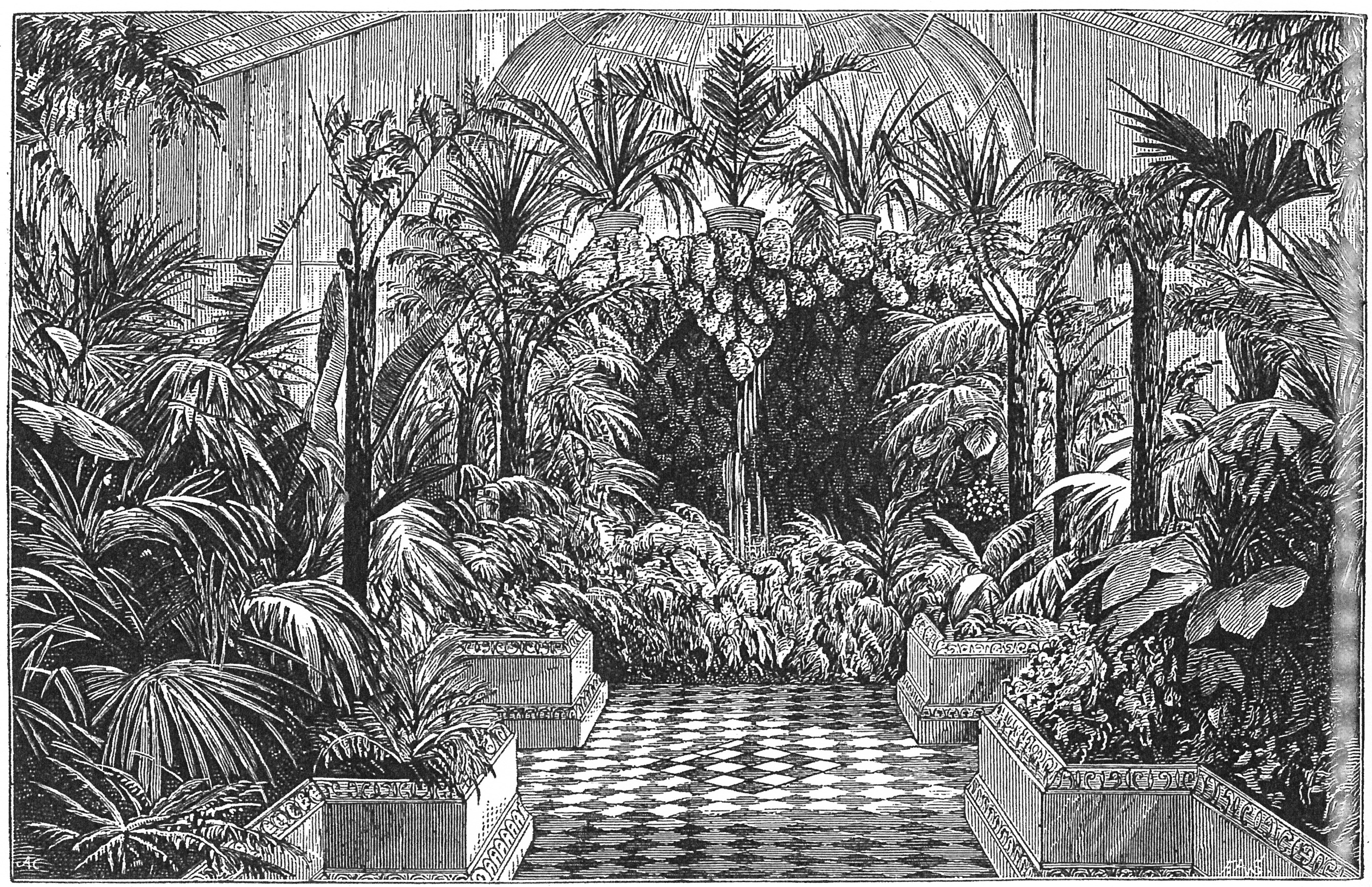 Grotte im Seitenflügel des Palmenhauses im Botanischen Garten Adelaide. Holzstich aus einem Führer des Bot. Gartens von 1878. Die Grotte wurde aufgebaut aus Stalagtiten, die aus dem Schwarzwald importiert wurden, vermutlich Erdmannshöhle.